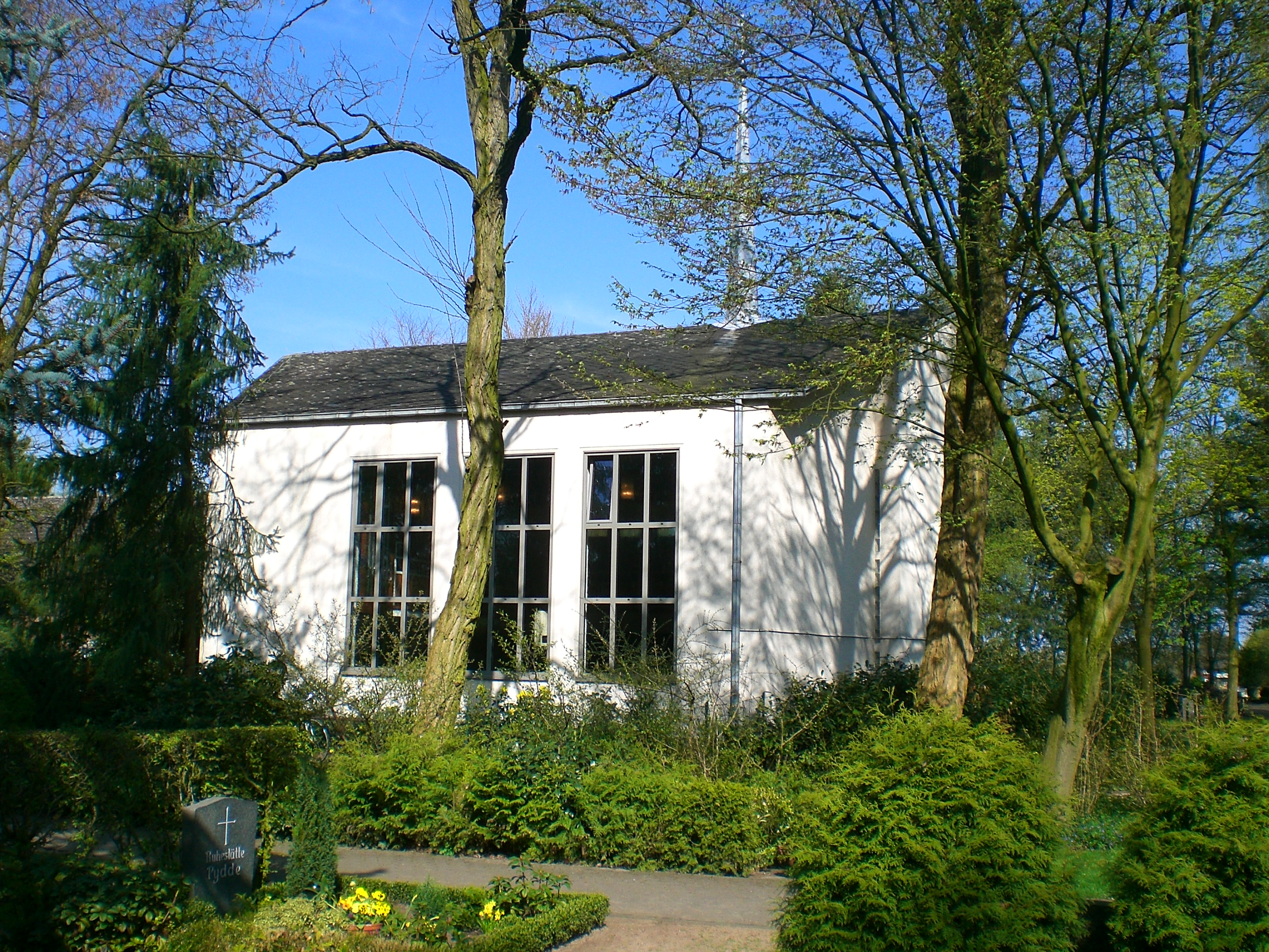 Seitenansicht der evangelischen Auferstehungskirche im Verler Ortsteil Sürenheide.